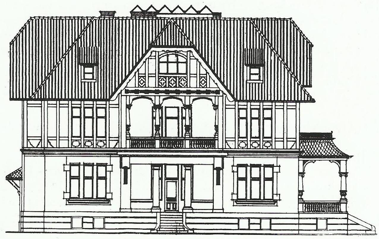 Denkmalgeschützte Villa, Adenauerallee 7, Bonn-Südstadt: Bauzeichnung, Aufriss der Rheinfront (Ostansicht)